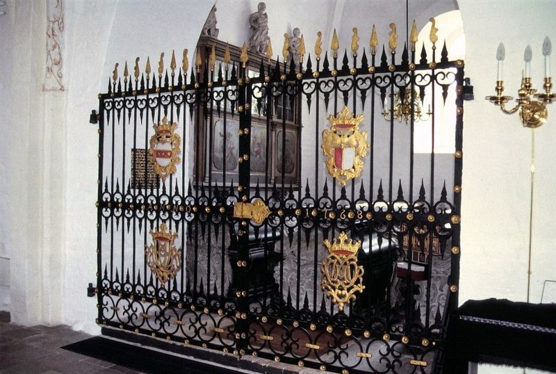 Østbirk Kirke i Danmark. Gitter til sydkapellet